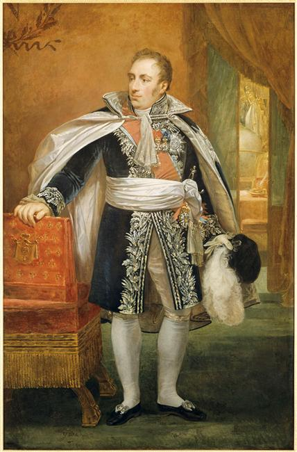 Pierre-Antoine-Noël-Mathieu Bruno, comte Daru (1767-1829).